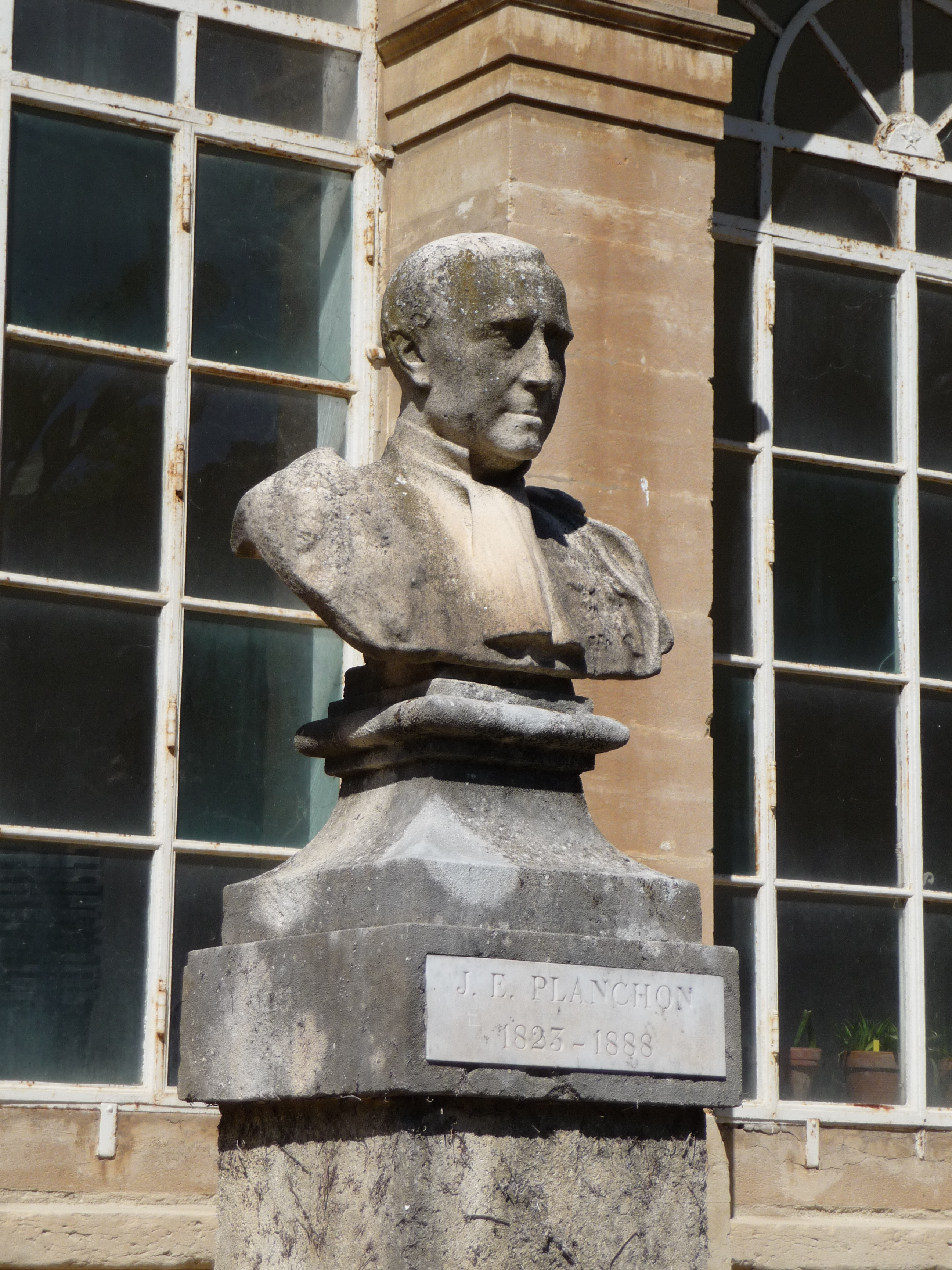 Bust de Jules Émile Planchon al Jardí Botànic de Montpeller .